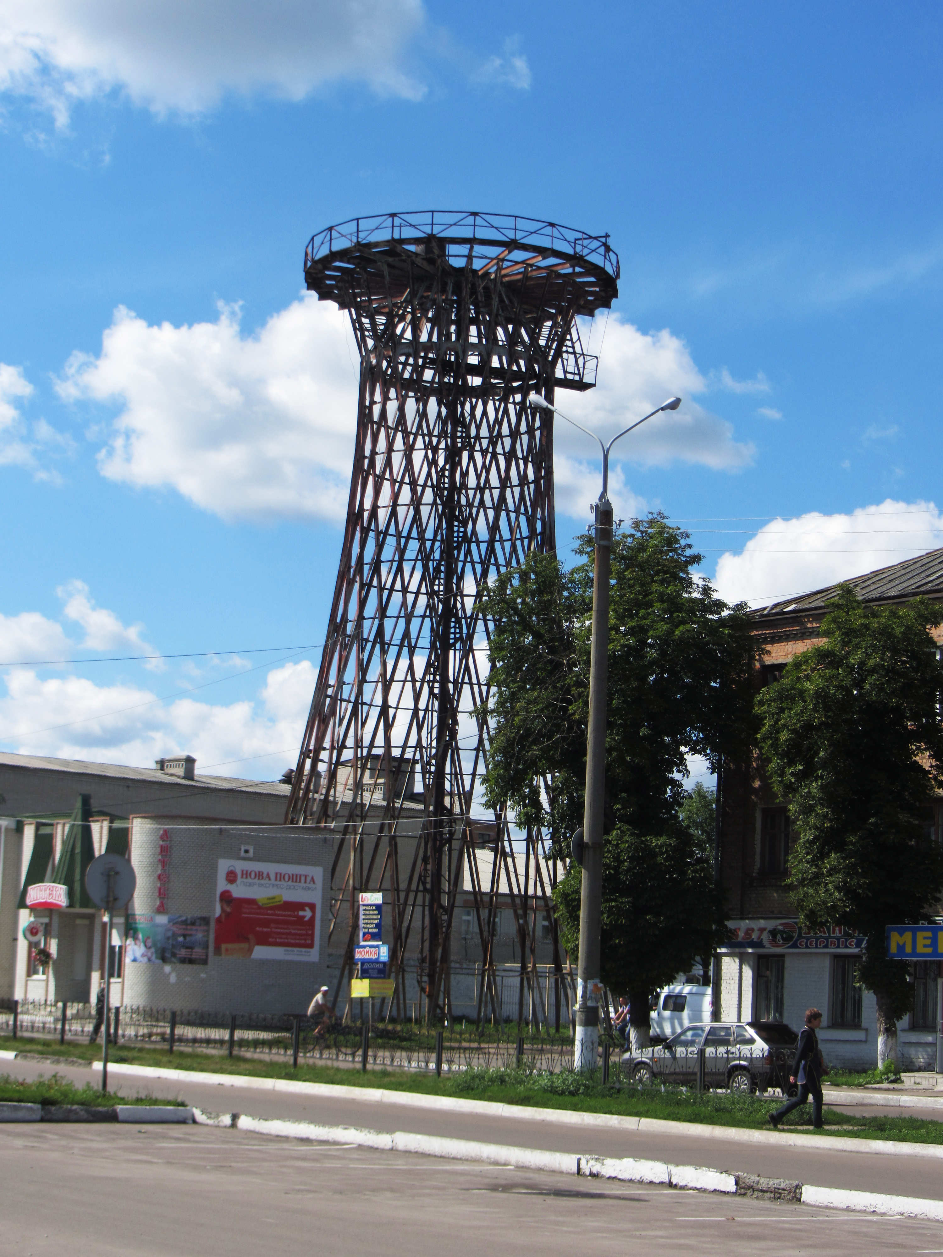 Водогінна вежа, Конотоп, пл. Конотопських дивізій